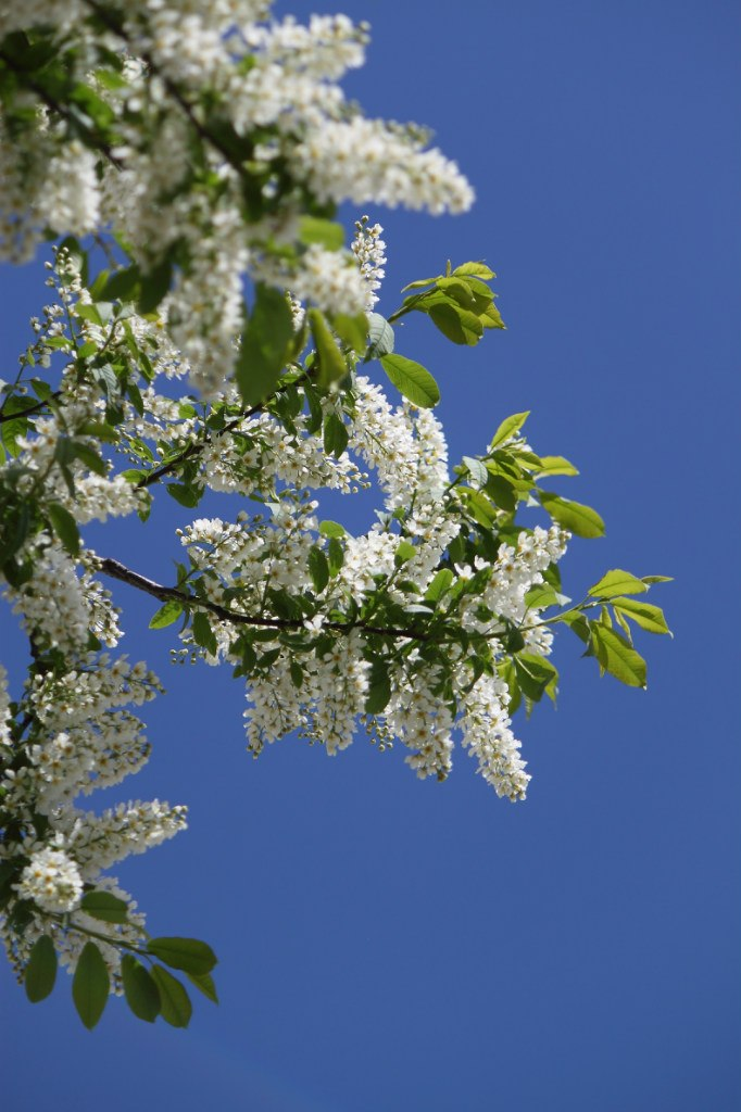 Cheryomukha. Nord-Western Russia, St.Petersburg